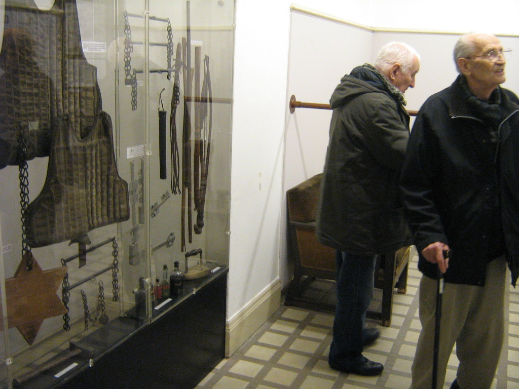 Rekonstrukce mučítny v Pečkově paláci v Praze